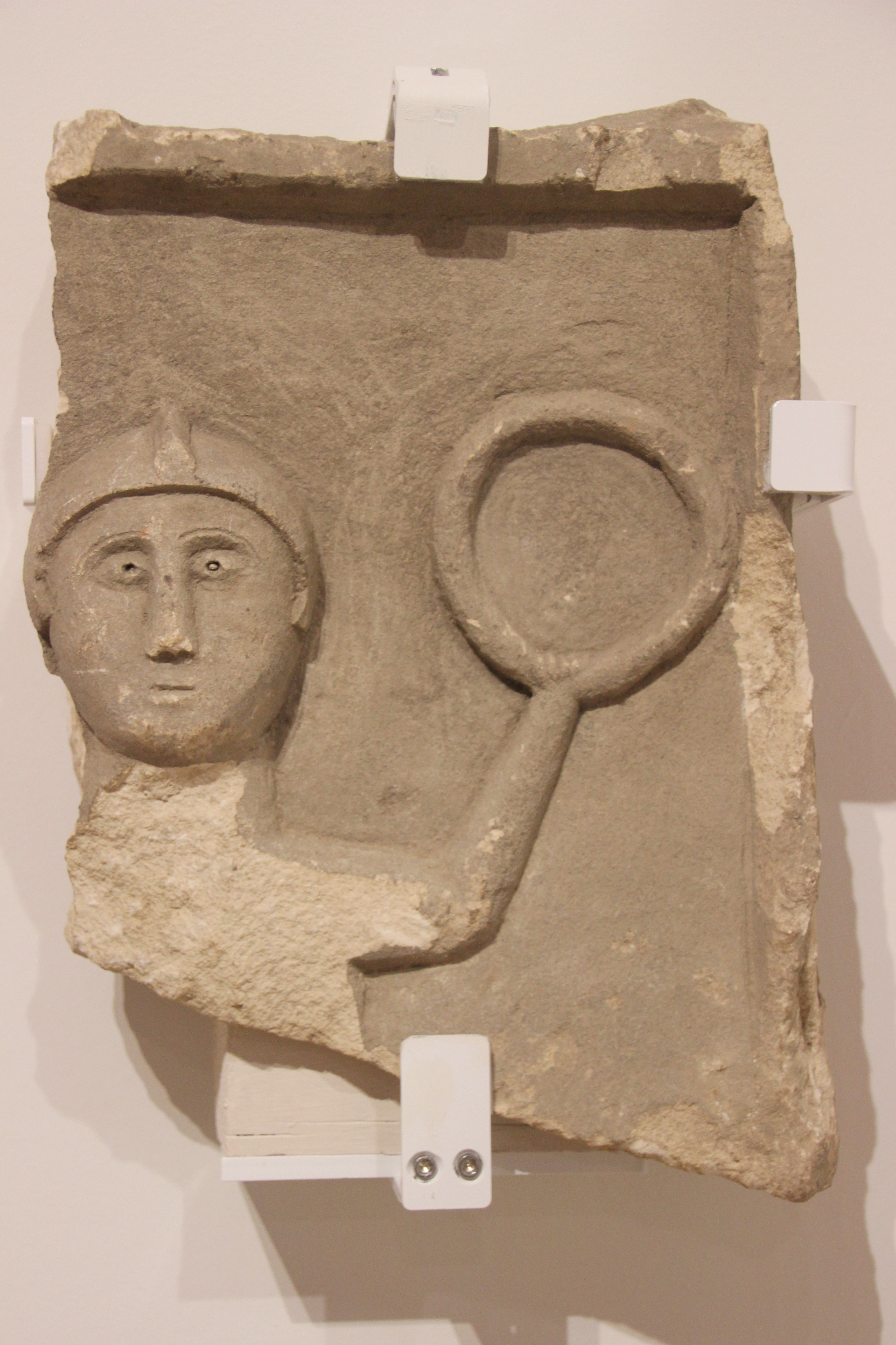 Relief mithriaque de Jort